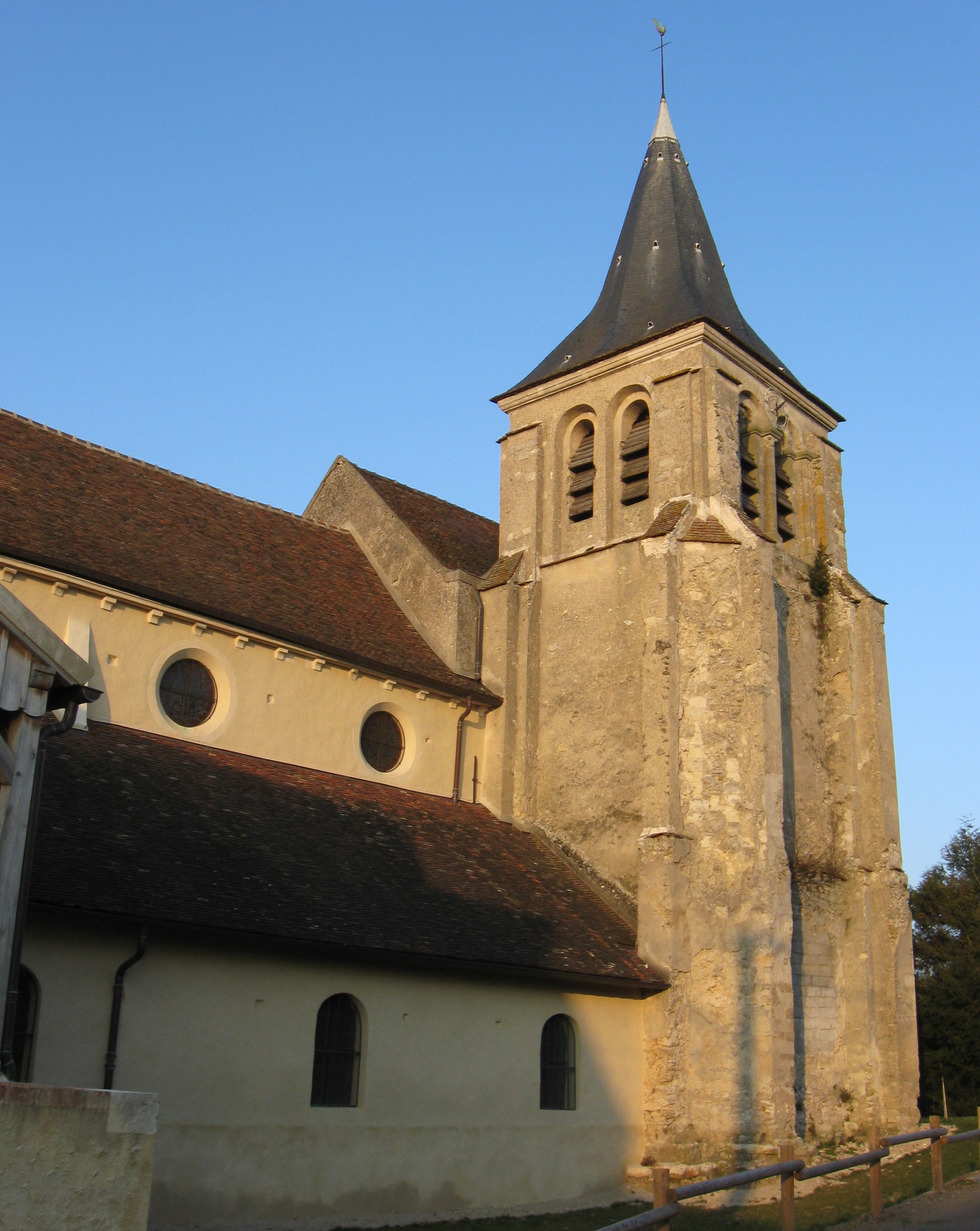 Église Saint-Rémi de Montévrain. (Seine-et-Marne, région Île-de-France).